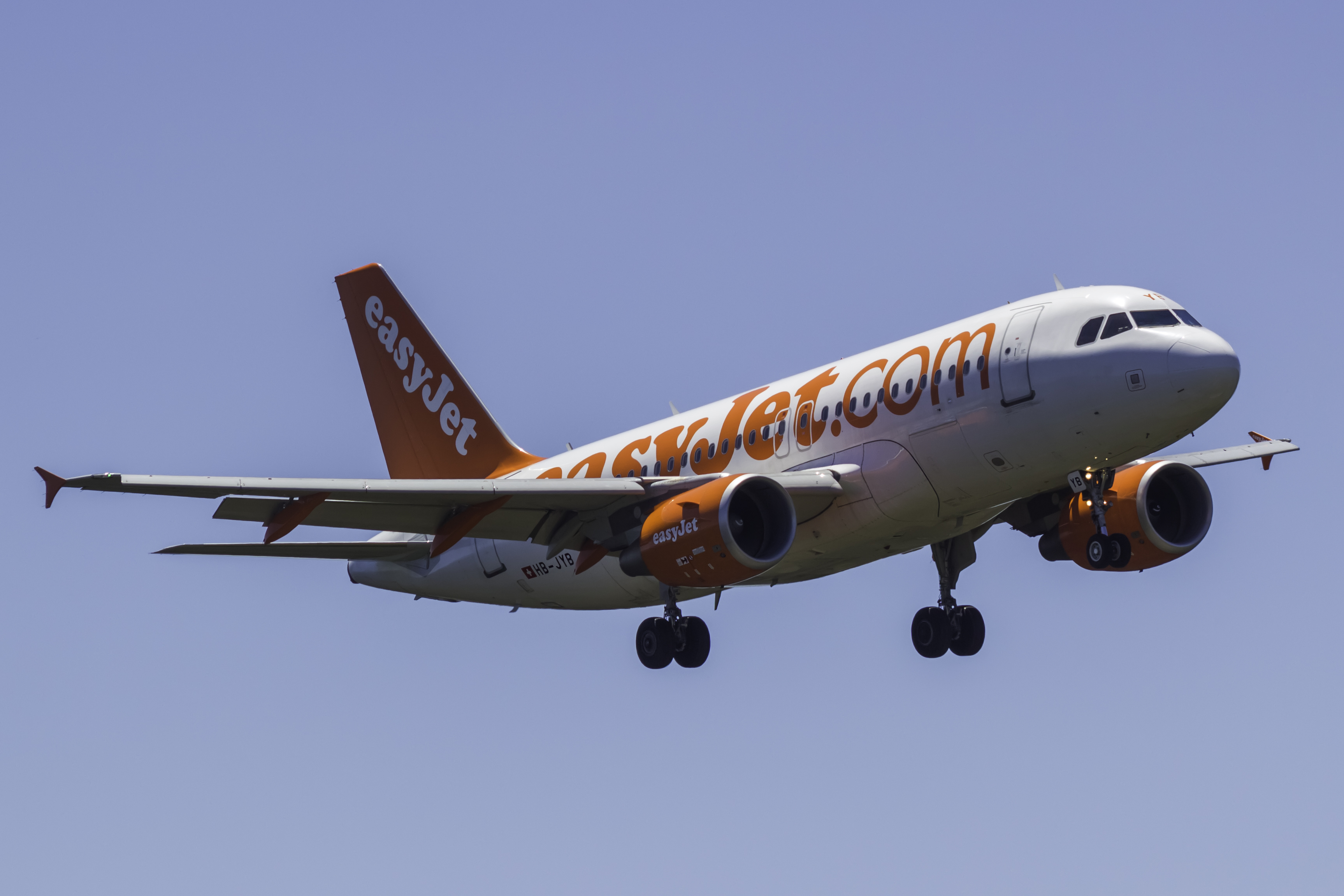 Airbus A319 de easyJet Switzerland aterrando no aeroporto de Santiago de Compostela.